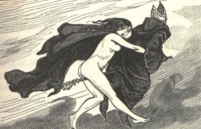 Dessins de Martin van Maële. Illustration de La sorcière, de Jules Michelet. 1911.